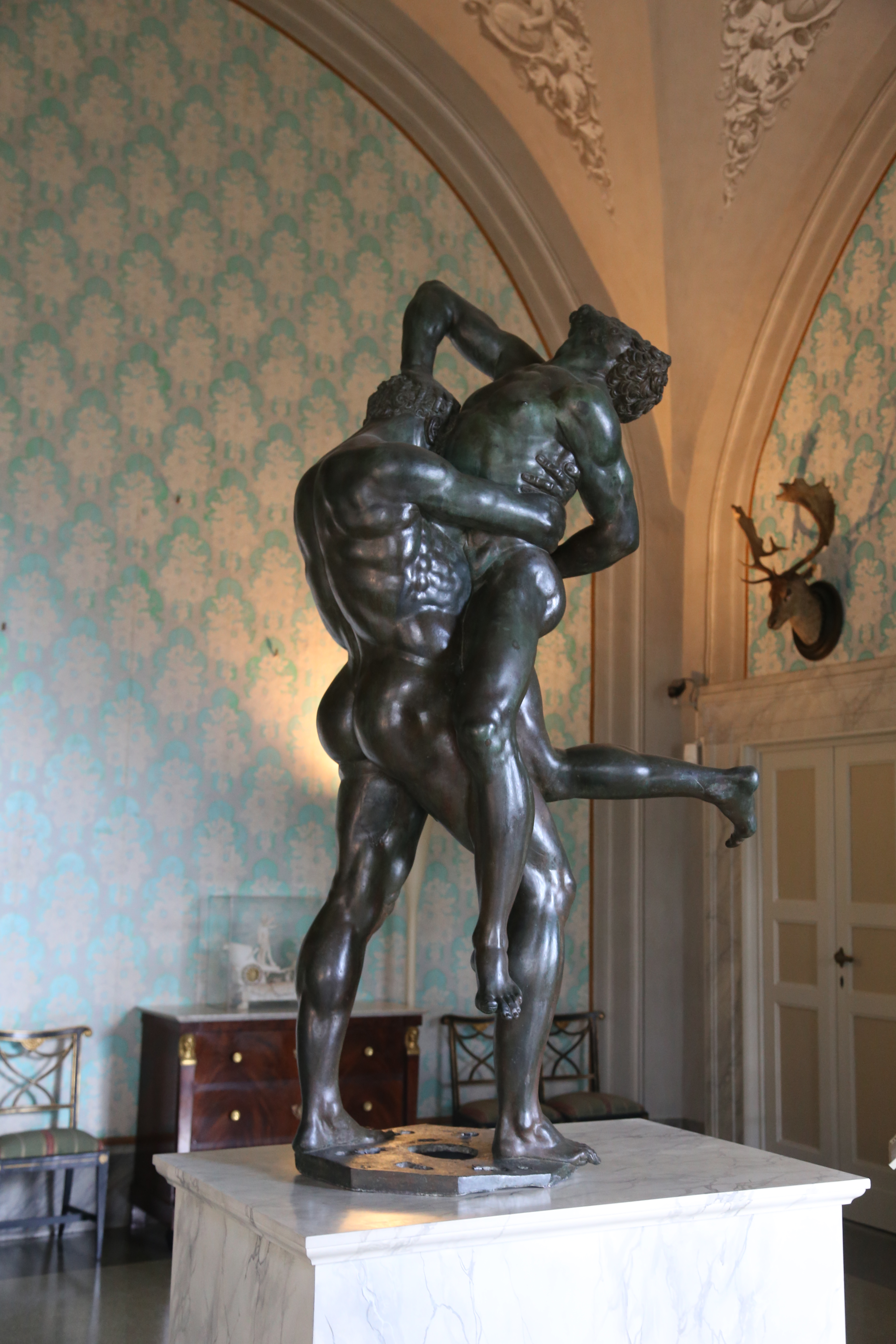 Villa La Petraia, Ercole e Anteo di Ammannati This is a photo of a monument which is part of cultural heritage of Italy. This monument participates in the context Wiki Loves Monuments Italia 2014.